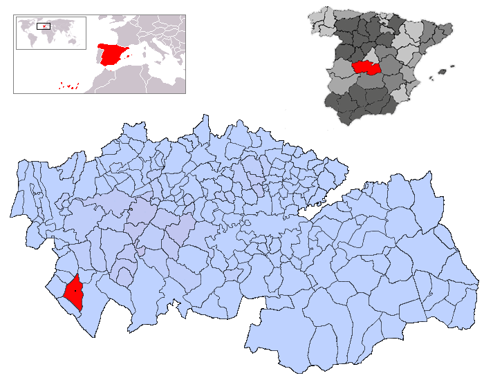 El_Campillo de la Jara en la provincia de Toledo